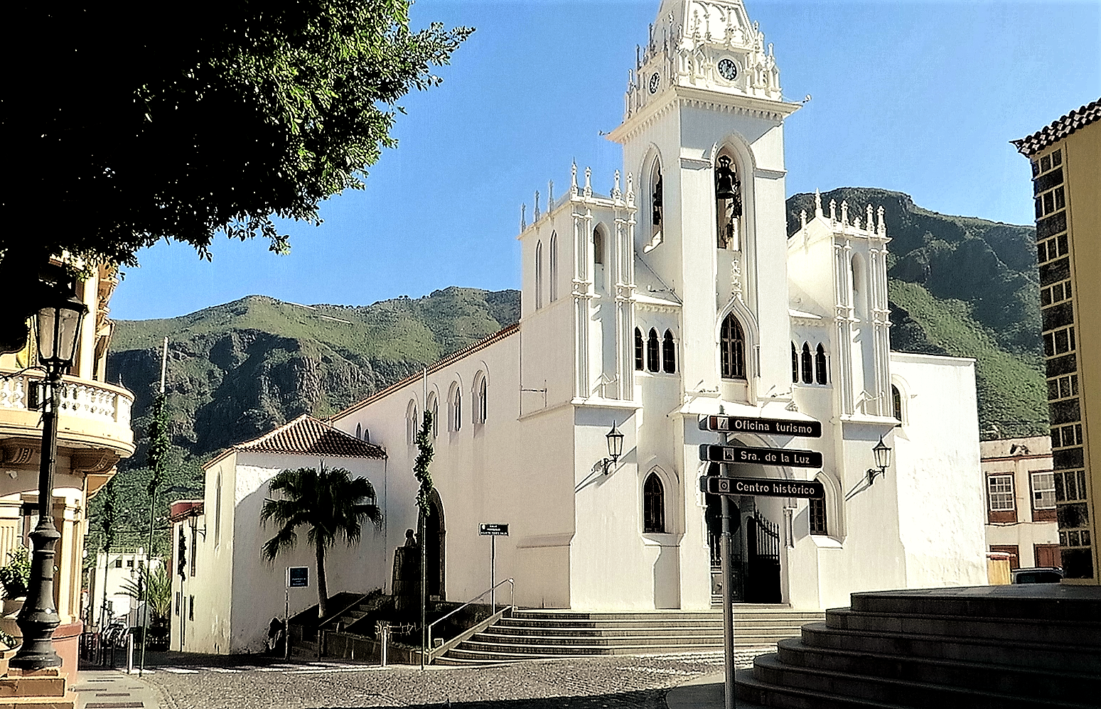 Scheeweiße Pfarrkirche in Los Silos aus dem 16. Jhdt.